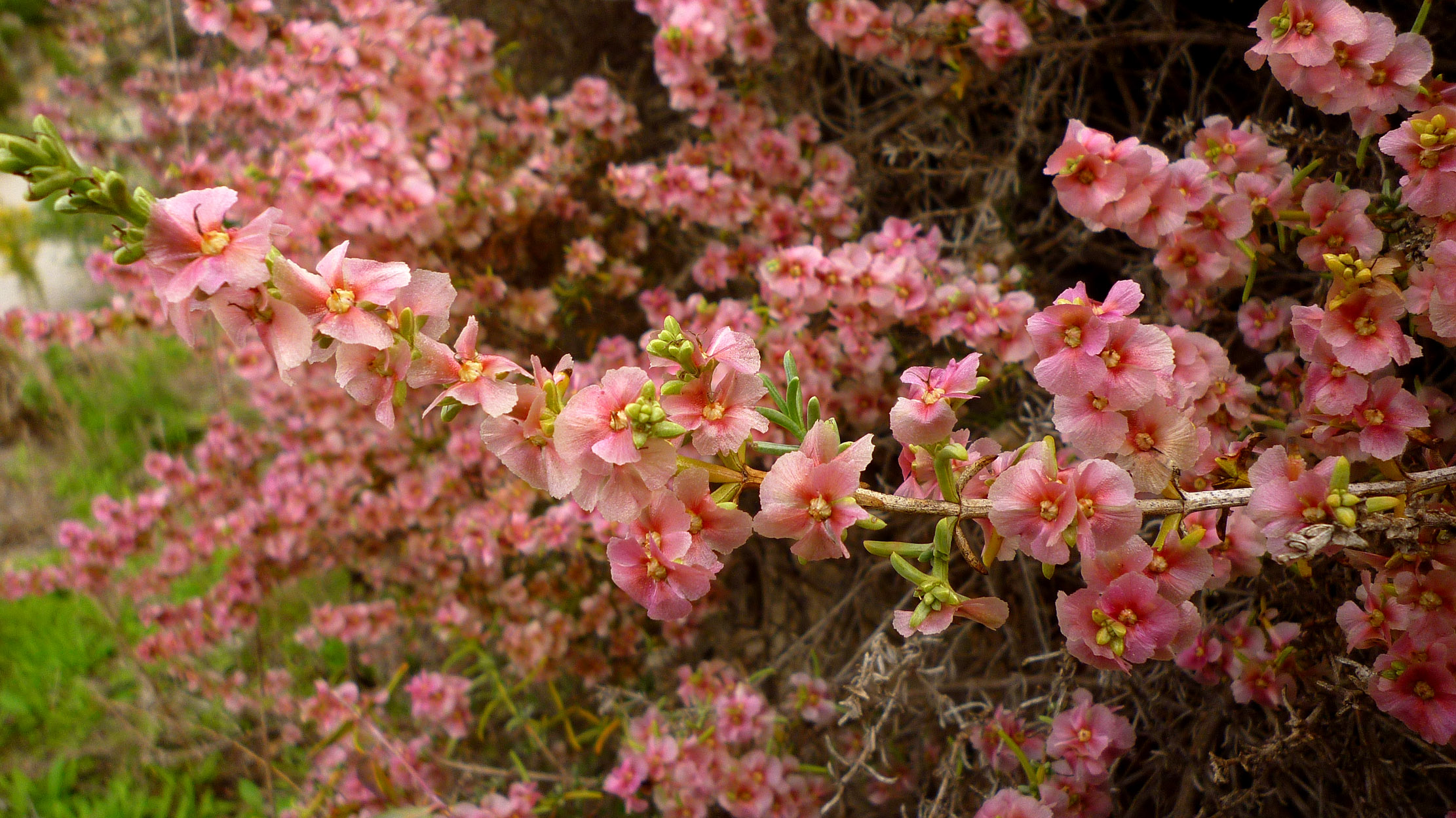 Salsola oppositifolia en flor en noviembre en el Monte San Julián (Cartagena, España)